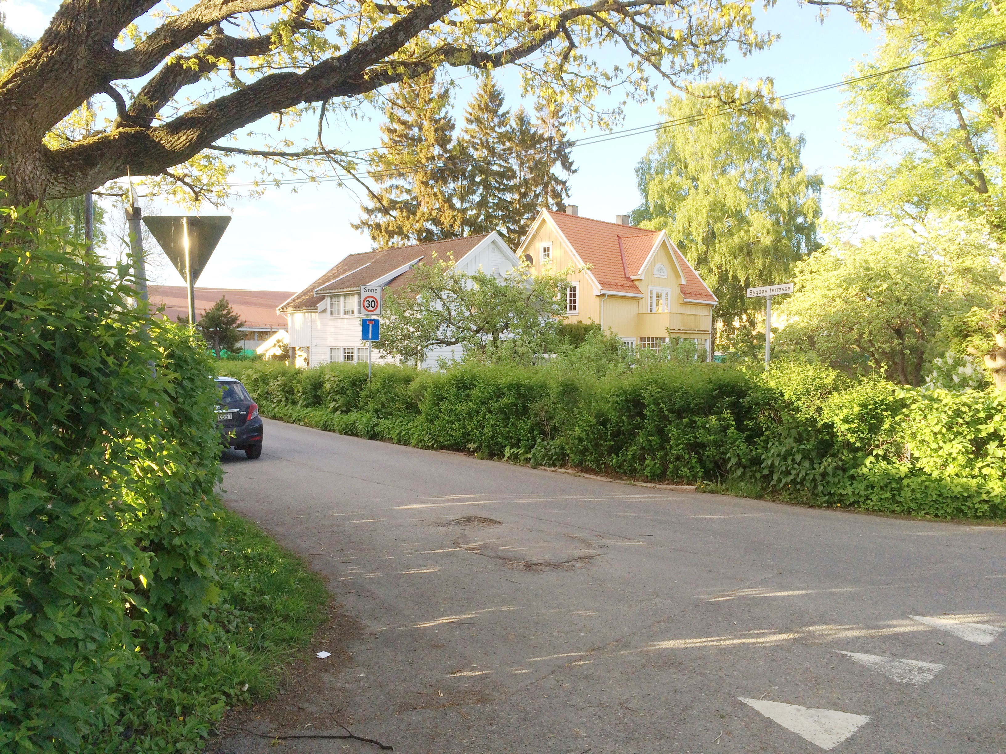 Bygdøy terrasse i sørenden mot Fredriksborgveien